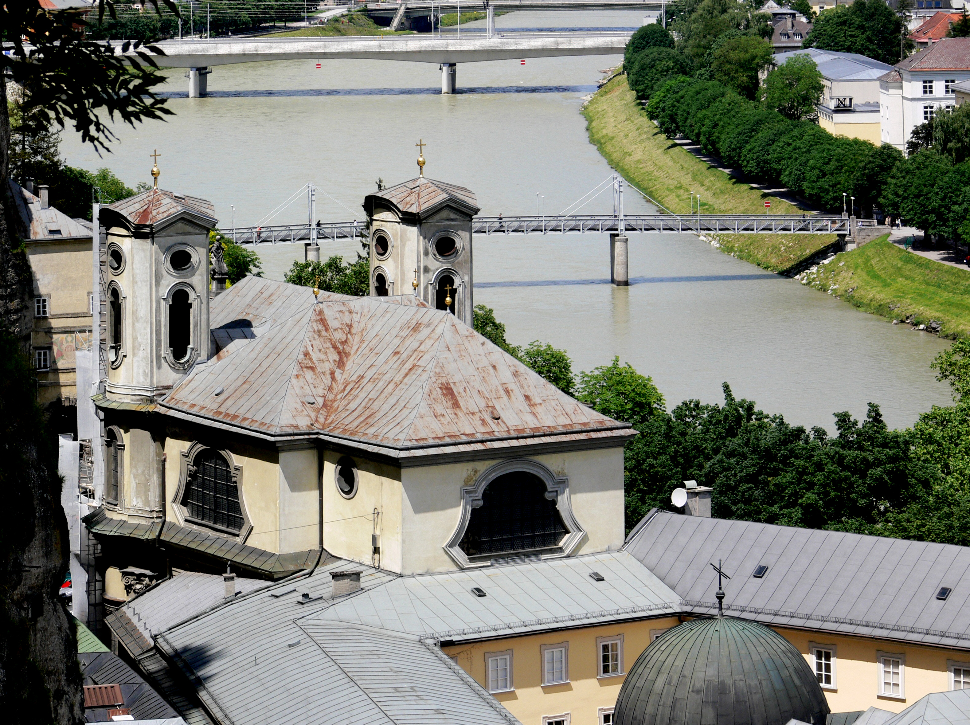 Salzburg, Aussicht vom Mönchsberg Markuskirche (Ursulinnenkirche)